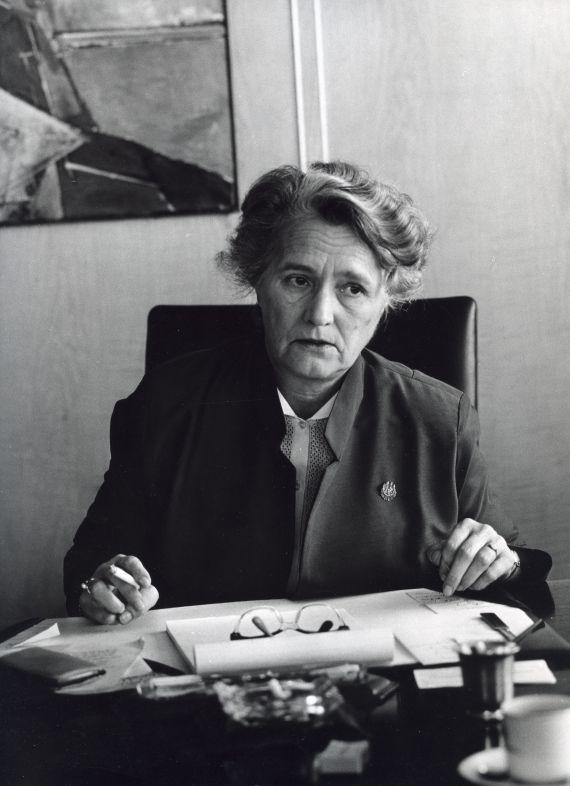 Marga Klompé, KVP-politica, minister, achter een bureau. Zonder plaats [Nederland], 1970.